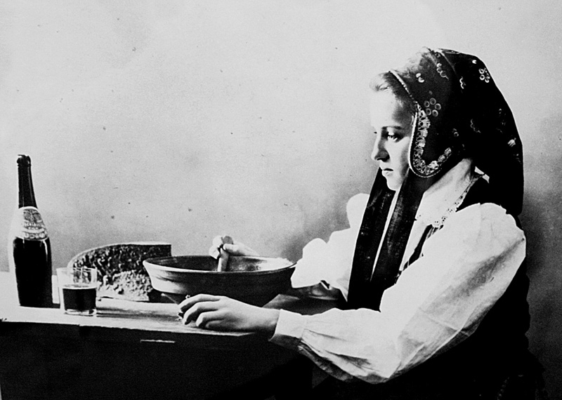 Сялянка, альбо Дзяўчына з місаю ў каптуры, Вялава